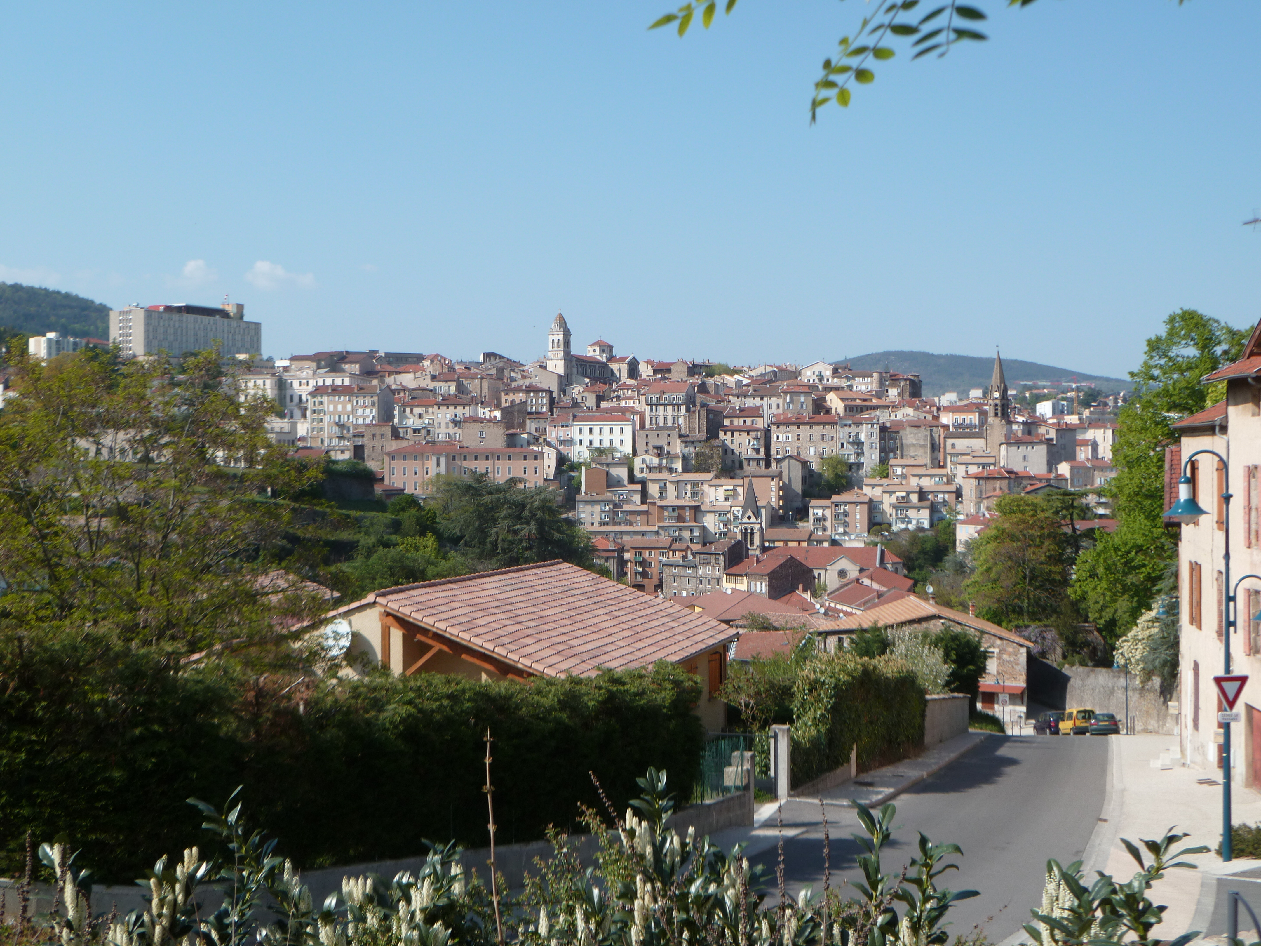 Annonay, vue depuis la Montée des Aygas.